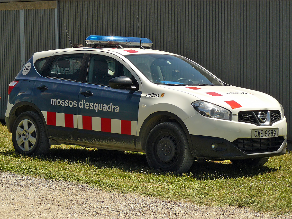 Nissan Qashqai Mossos d´Esquadra. Barcelona